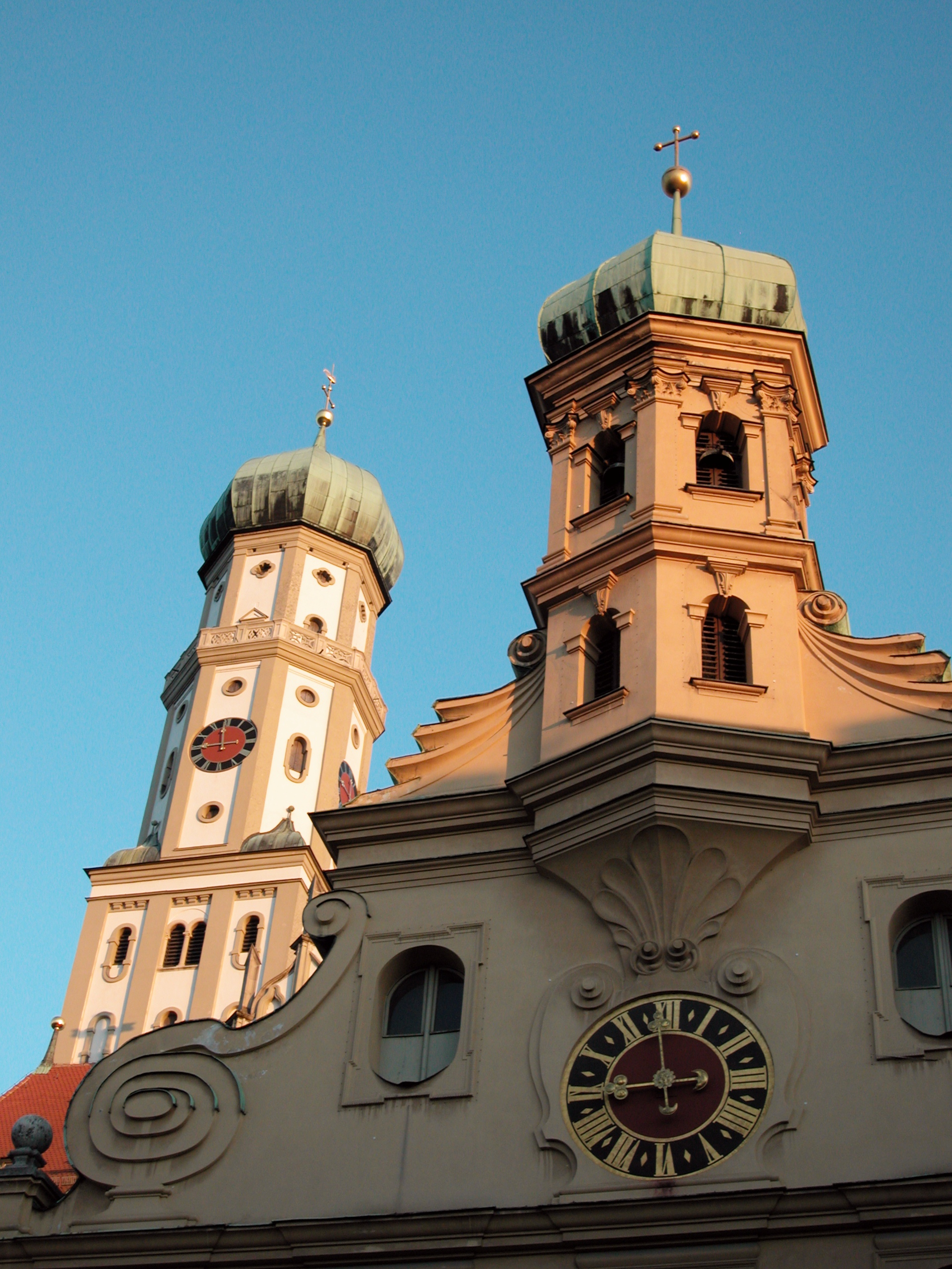 Augsburg Türme der evangelischen und der katholischen Ulrichskirchen, Symbol des Augsburger Religionsfriedens